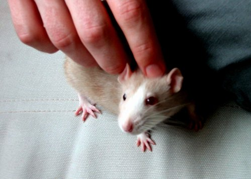 Oddeye rat